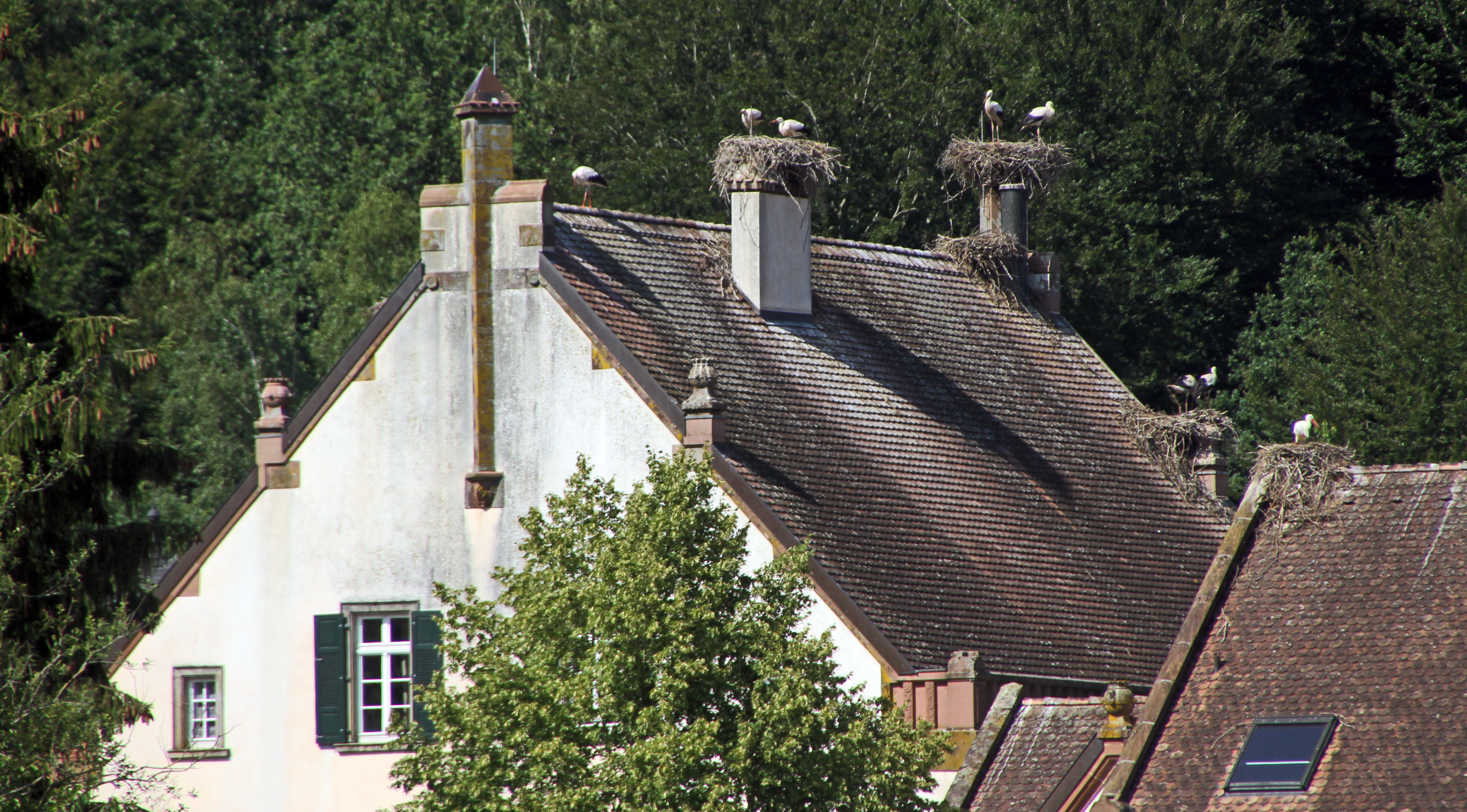 Kirschbacherhof (Dietrichingen)